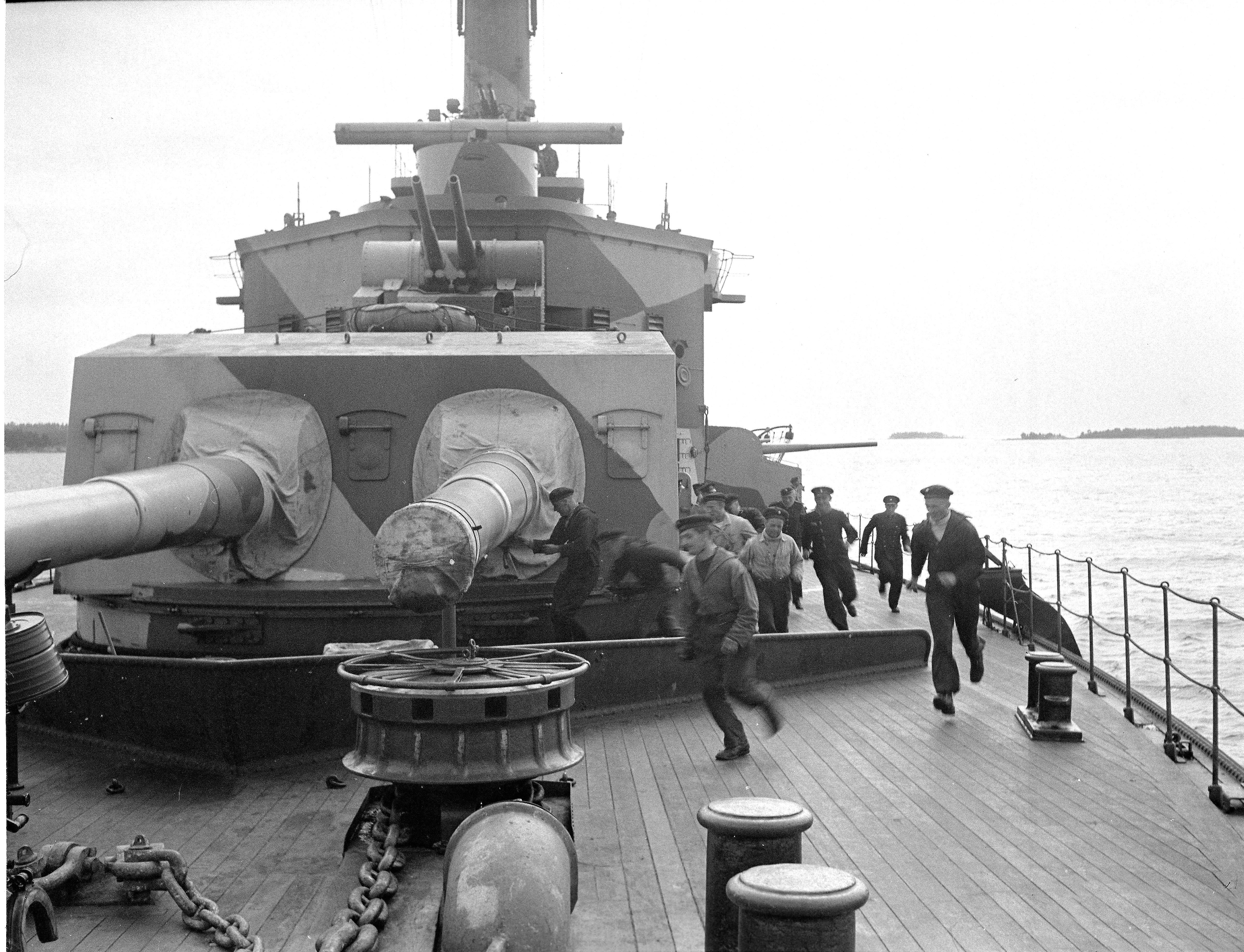 Hälytyskellot soivat. (Kuvauspaikka: Panssarilaiva Väinämöinen)